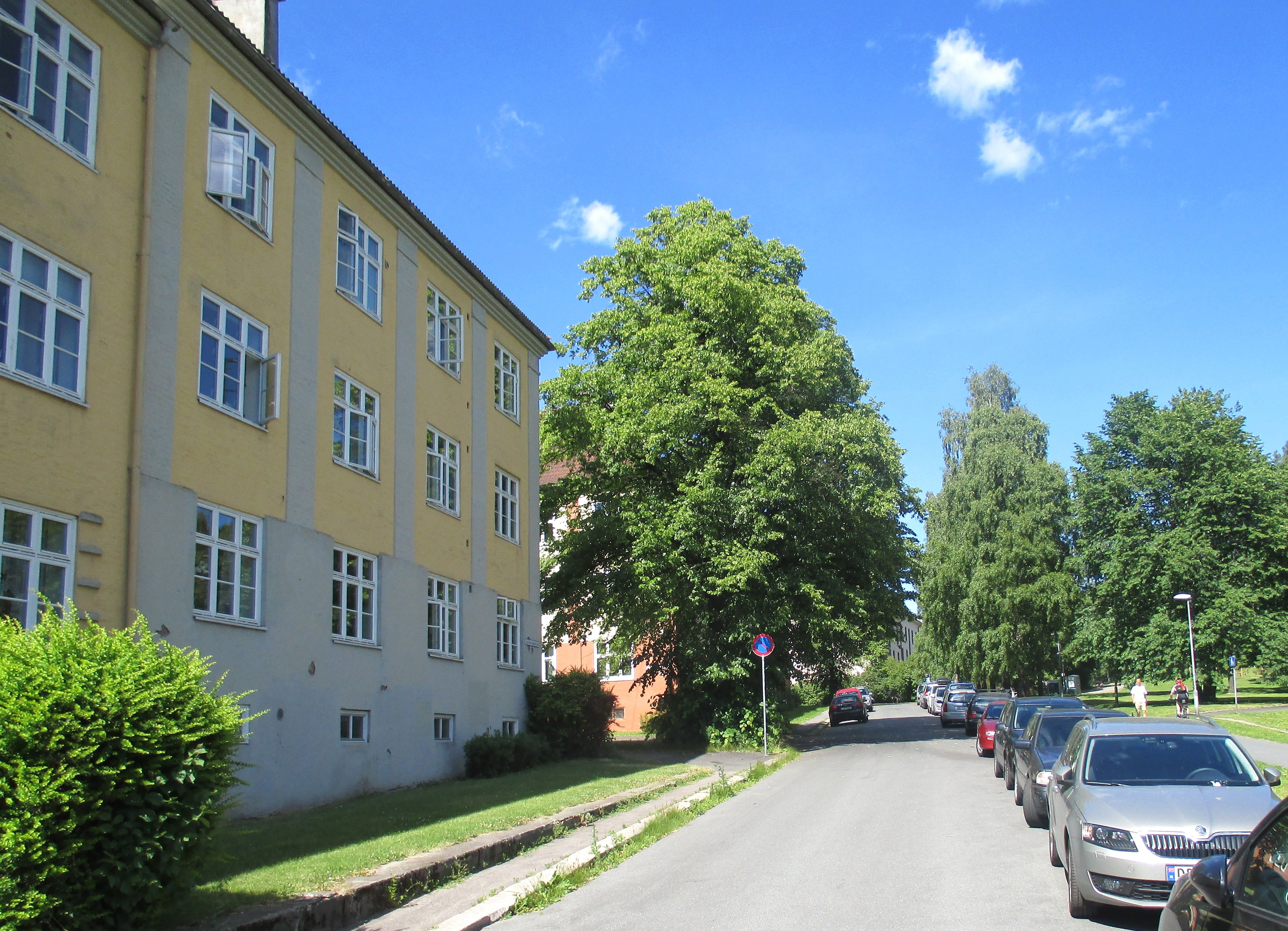 Jolly Kramer-Johansens gate på Torshov i Oslo